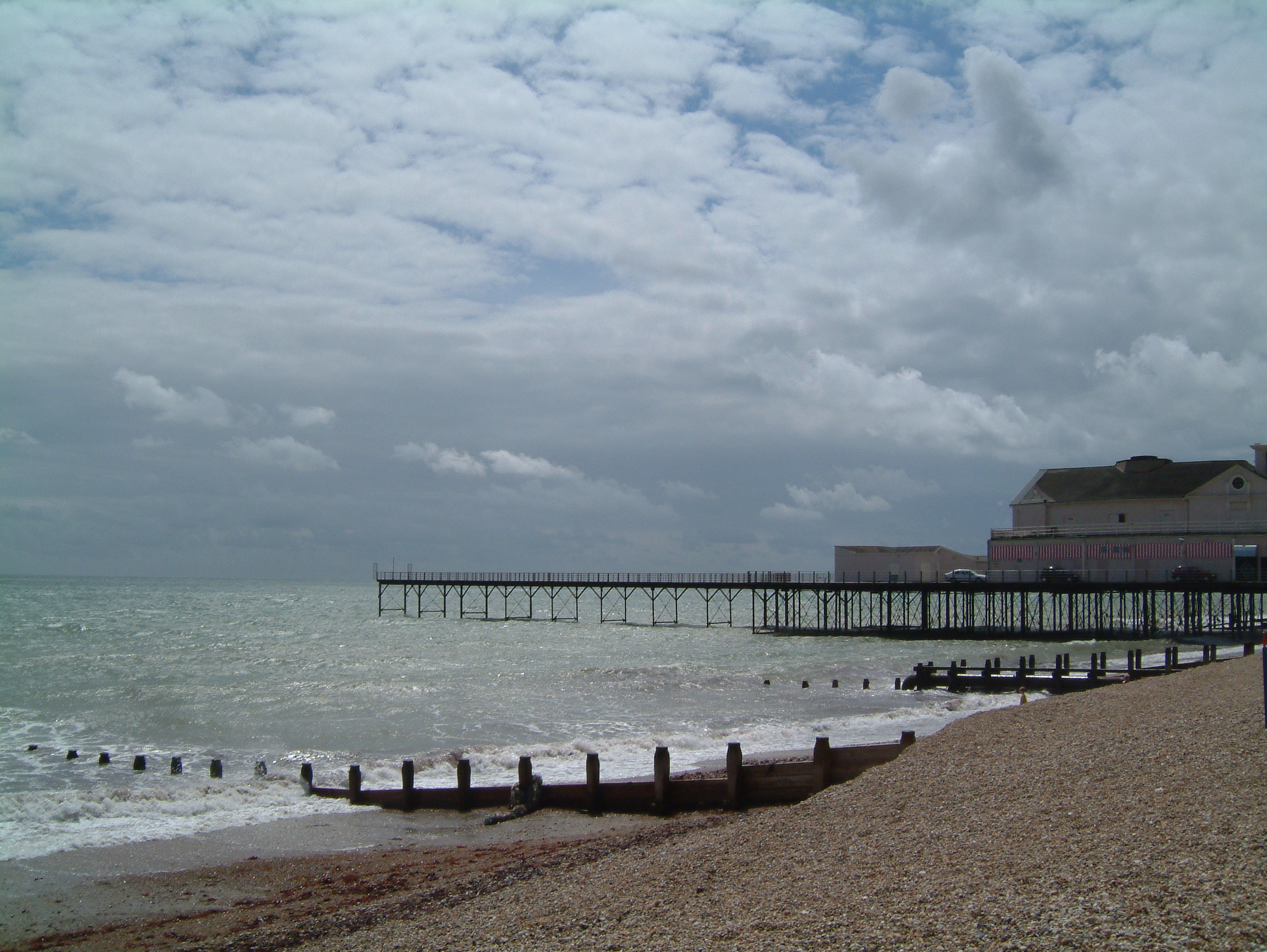 Le front de mer de Bognor regis.